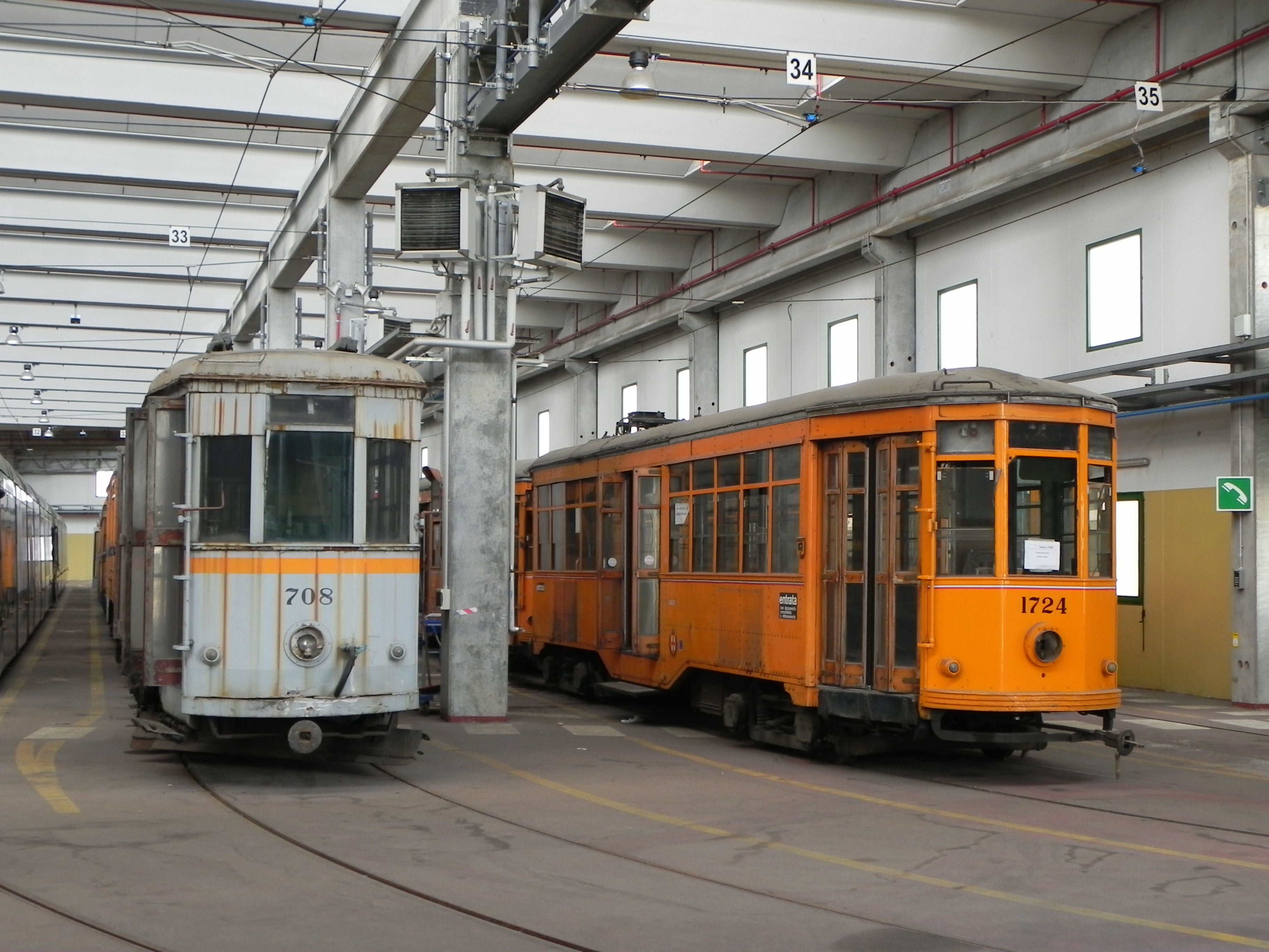 Vetture tranviarie accantonate nel deposito di Precotto